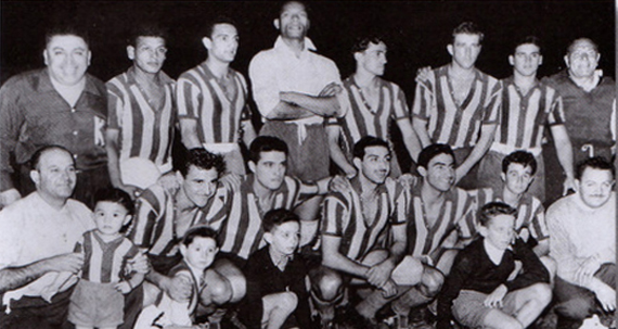 Parados: Néstor Cardoso, Juan Biagioli, Wálter Ormeño, Carlos Alvarez, José Poi, Alberto Ducca; hincados: Oscar Mottura, Alberto Sánchez, Miguel Antonio Juárez, Juan Castro, Ricardo Giménez.